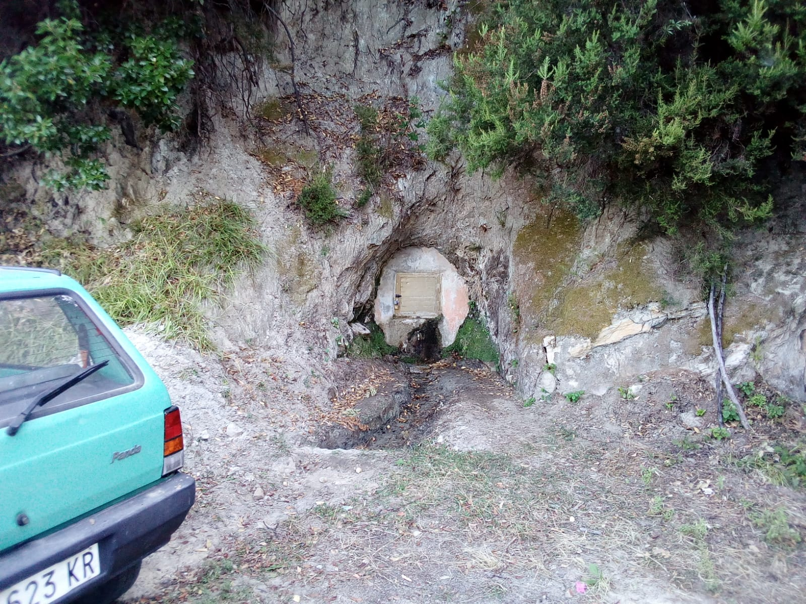 La fonte Morzidara